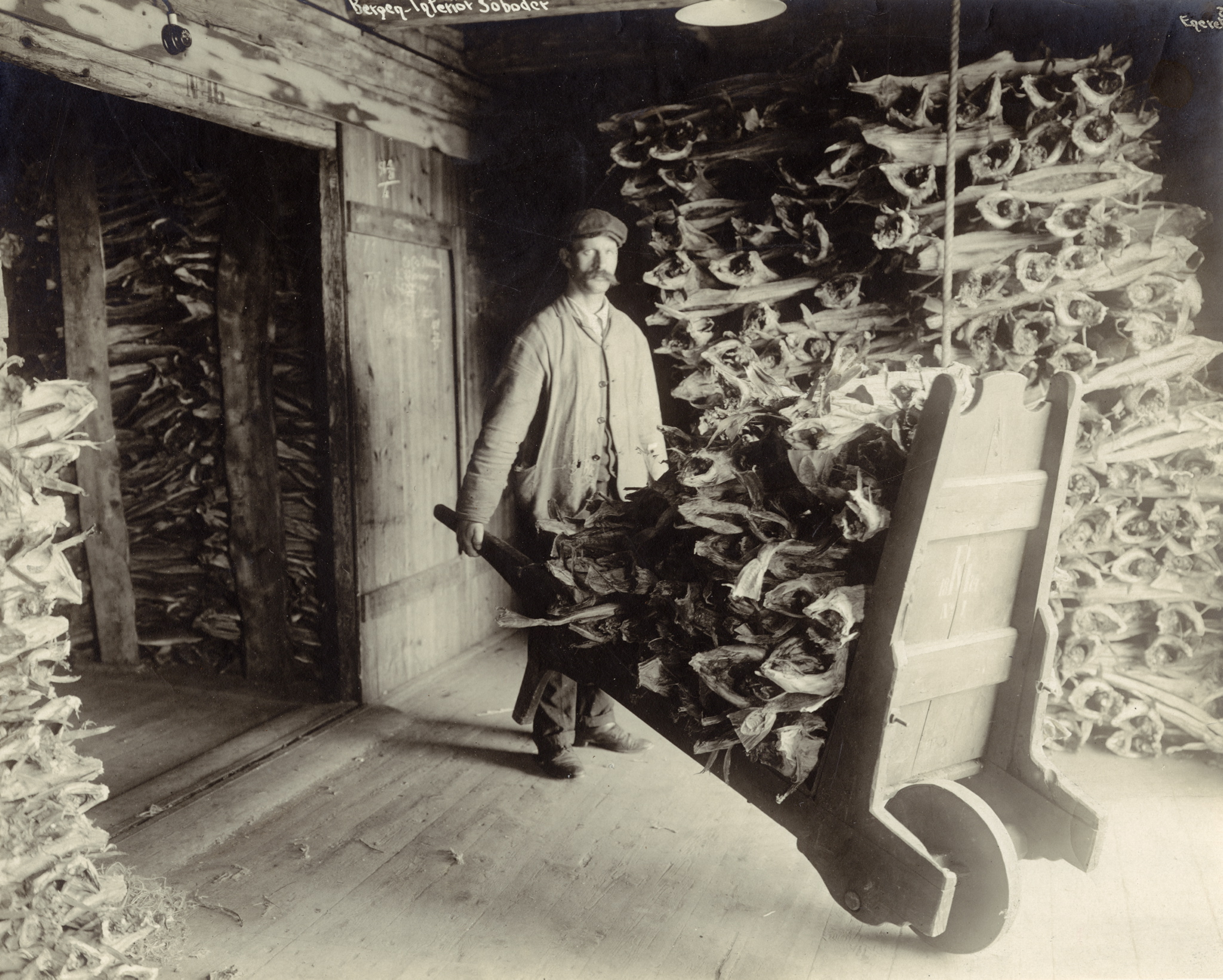 Bryggen Tyskebryggen Fotograf: Wilse, Anders Beer (1865-1949) Datering: Ca 1910 til 1920 Sted: Bergen Hordaland Se flere bilder på Kulturminnebilder